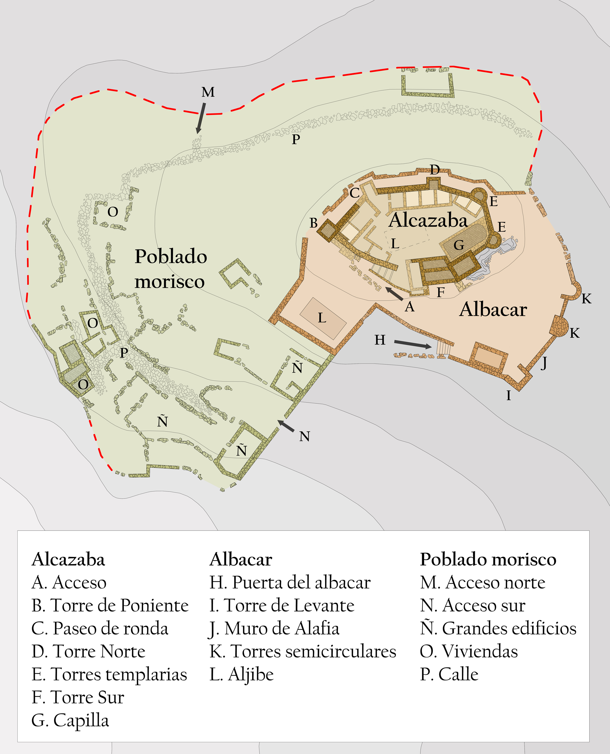 Castillo de Xivert. Plano indicativo de los diferentes elementos de la fortificación presentes en la actualidad. Se indican con diferentes colores los recintos de la alcazaba, del albacar y del poblado situado en la ladera próxima así como el trazado aproximado de las murallas de cada uno de ellos allí donde se ha perdido. Los nombres dados para los elementos son los utilizados en los estudios arqueológicos actuales. Alcalá de Xivert, provincia de Castellón, Comunidad Valenciana, España.